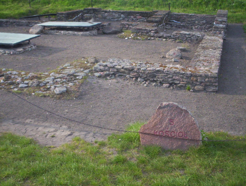 Kościół na Ostrowiu Lednickim